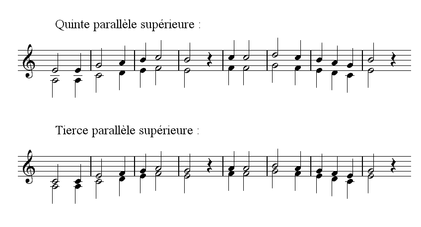 Description : Mélodie_parallèle Source : Personnelle Licence : GFDL